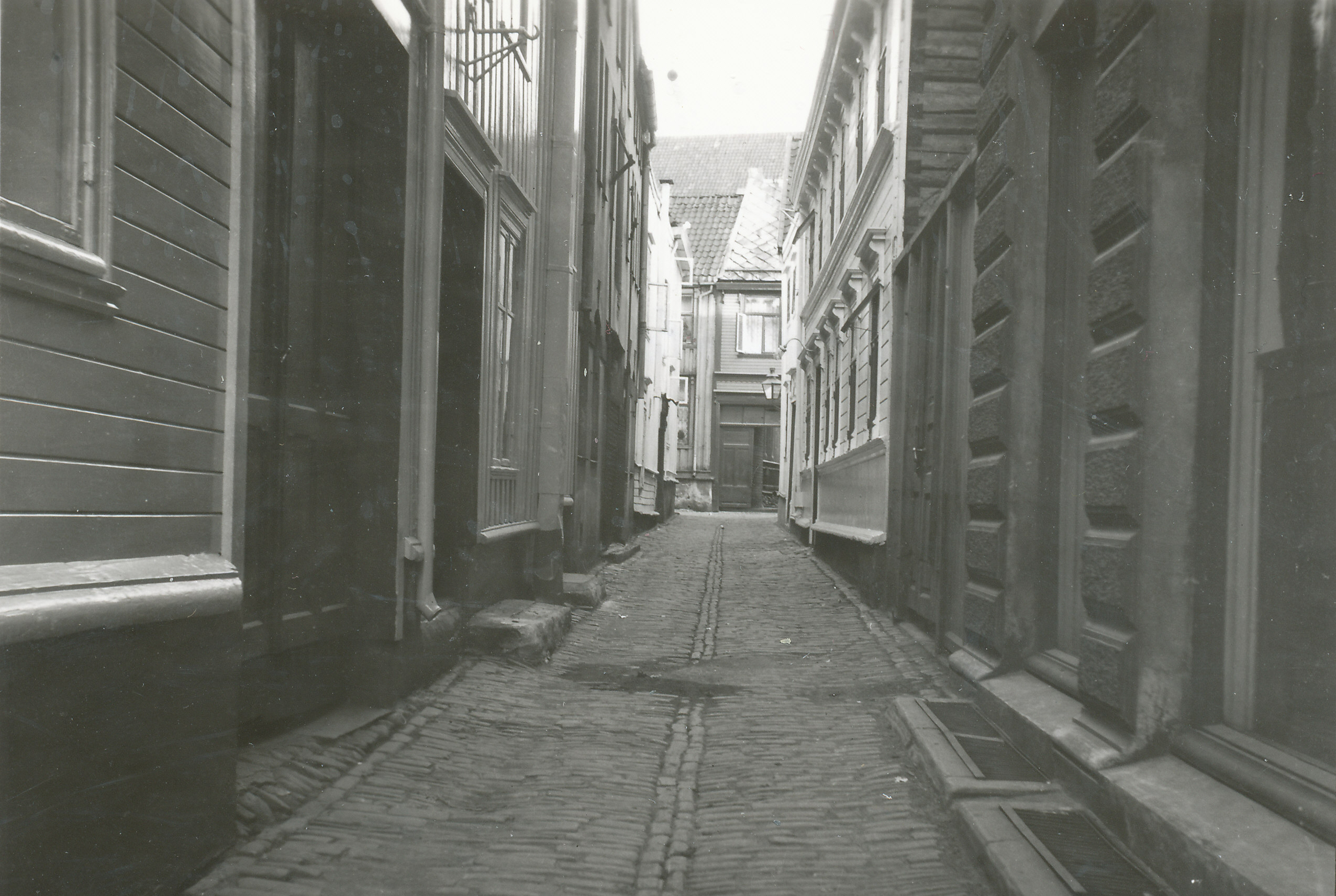 Credoveita sett fra Fjordgata. Veita er oppkalt etter slakter Ole Credo som bodde i veita på slutten av 1600 - tallet. Fra Arne Jakobsens privatarkiv (1930)